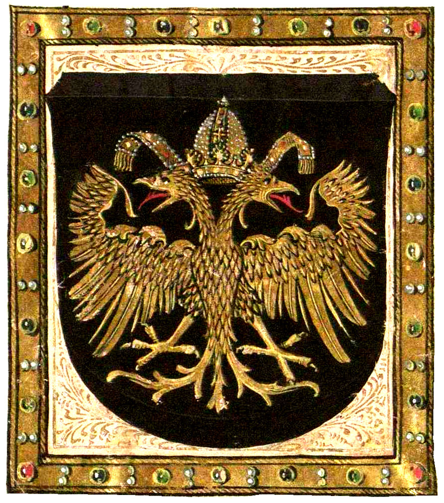 Wappen der Stadt Krems, verliehen von Kaiser Friiedrich III. am 01.04.1463 in Wiener Neustadt